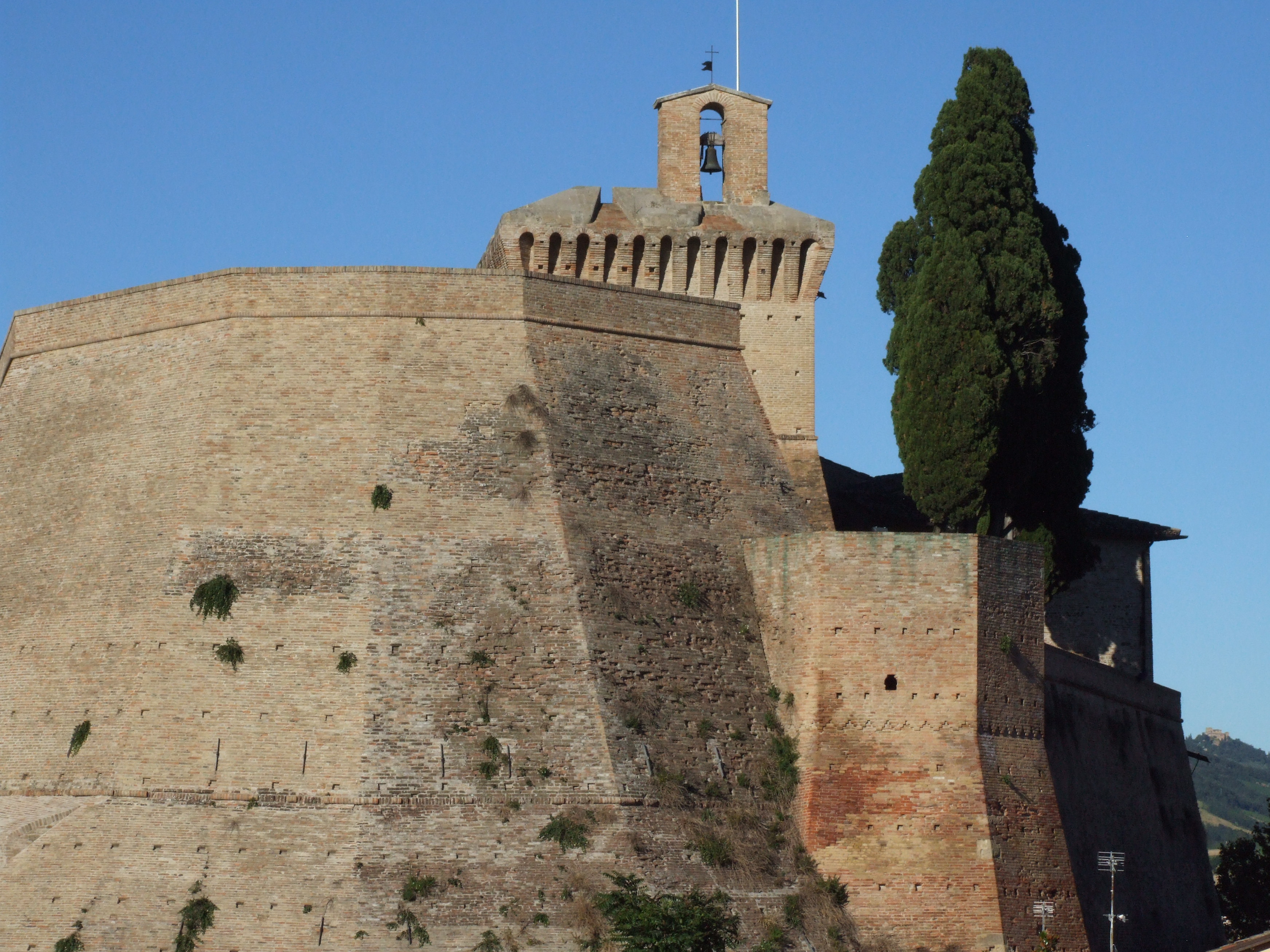 Rocca di Meldola This is a photo of a monument which is part of cultural heritage of Italy.